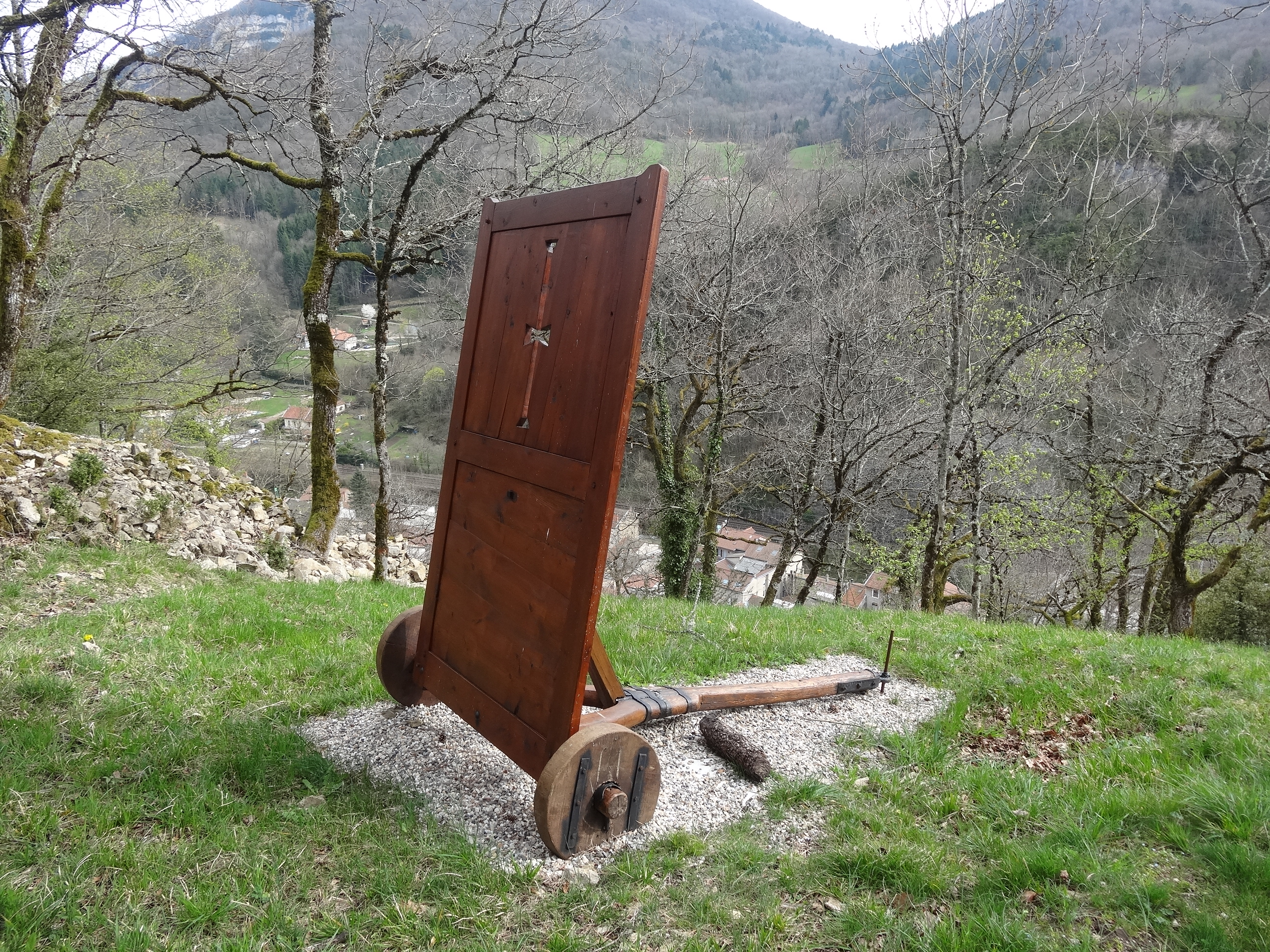 Mantelet, château de Cornillon, France